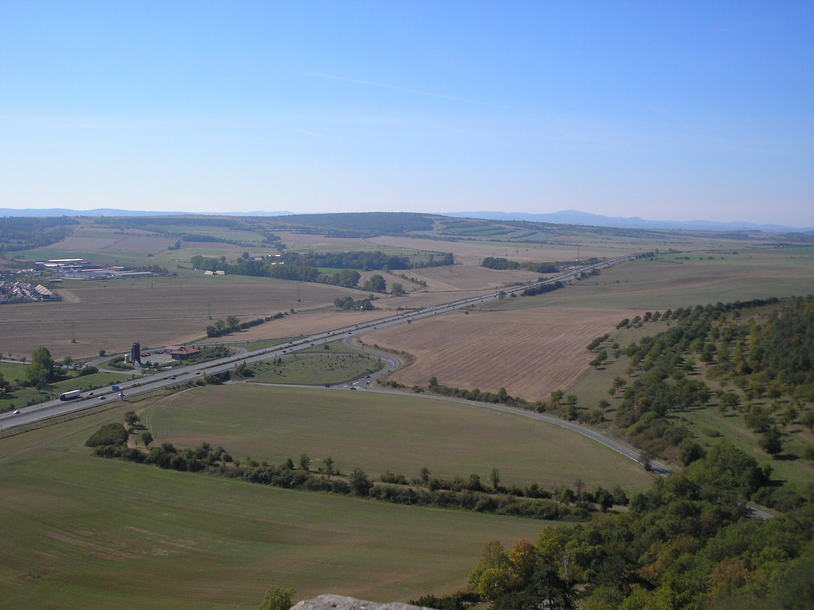 Die A4 und das Thüringer Becken von der Burg Gleichen aus betrachtet.